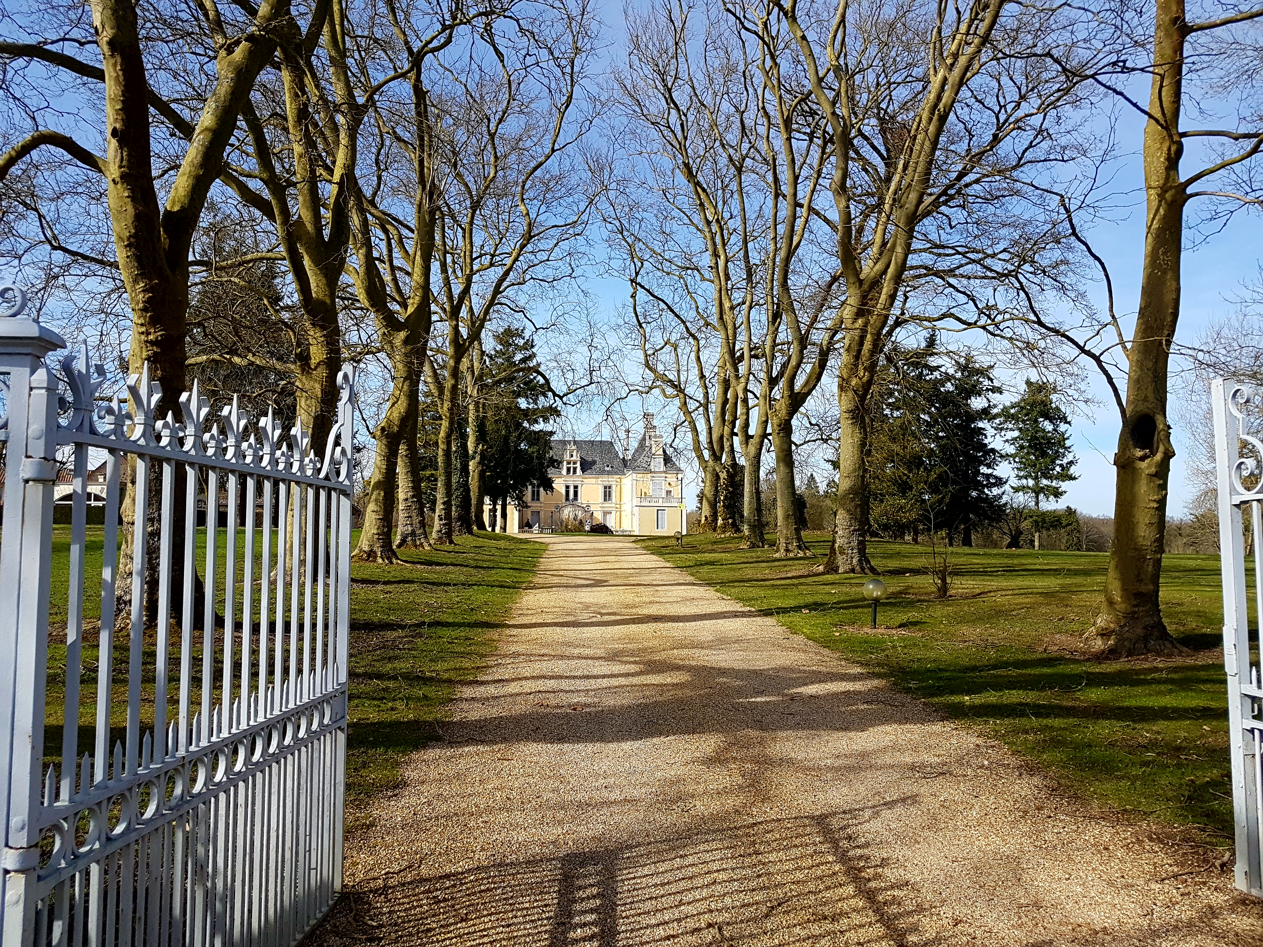 Superbe édifice se trouvant sur la commune de Les Forges.